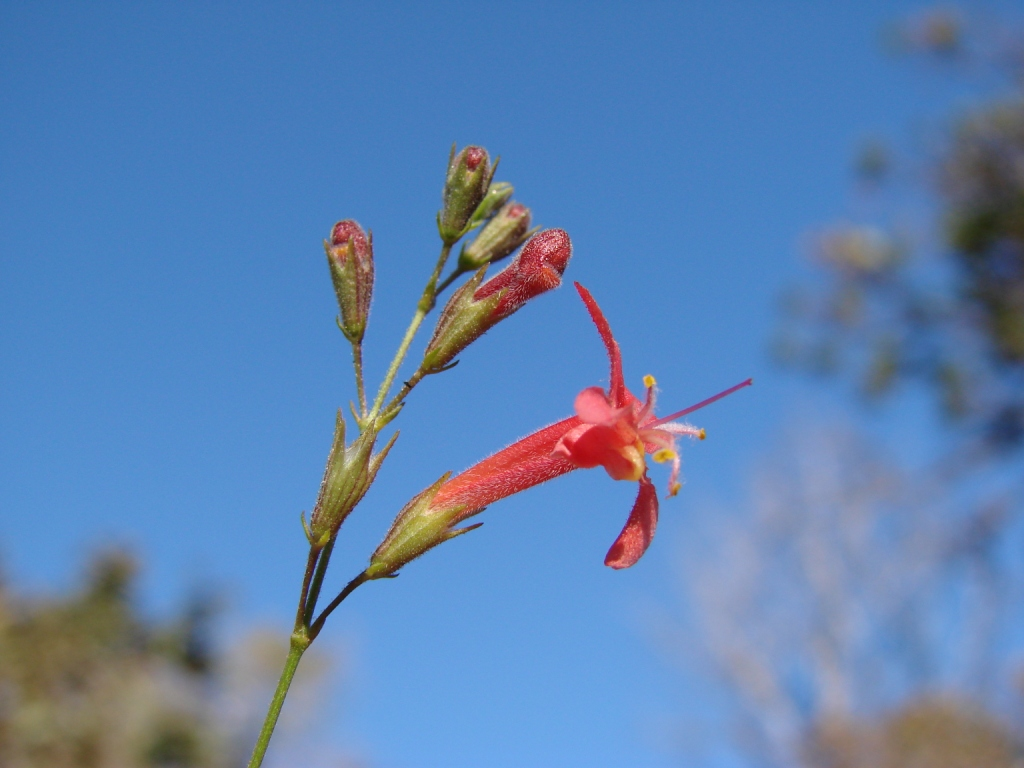 Hypenia macrantha - LAMIACEAE (Labiatae) Jardim Botânico de Brasília - Brasília - Distrito Federal - Brasil.